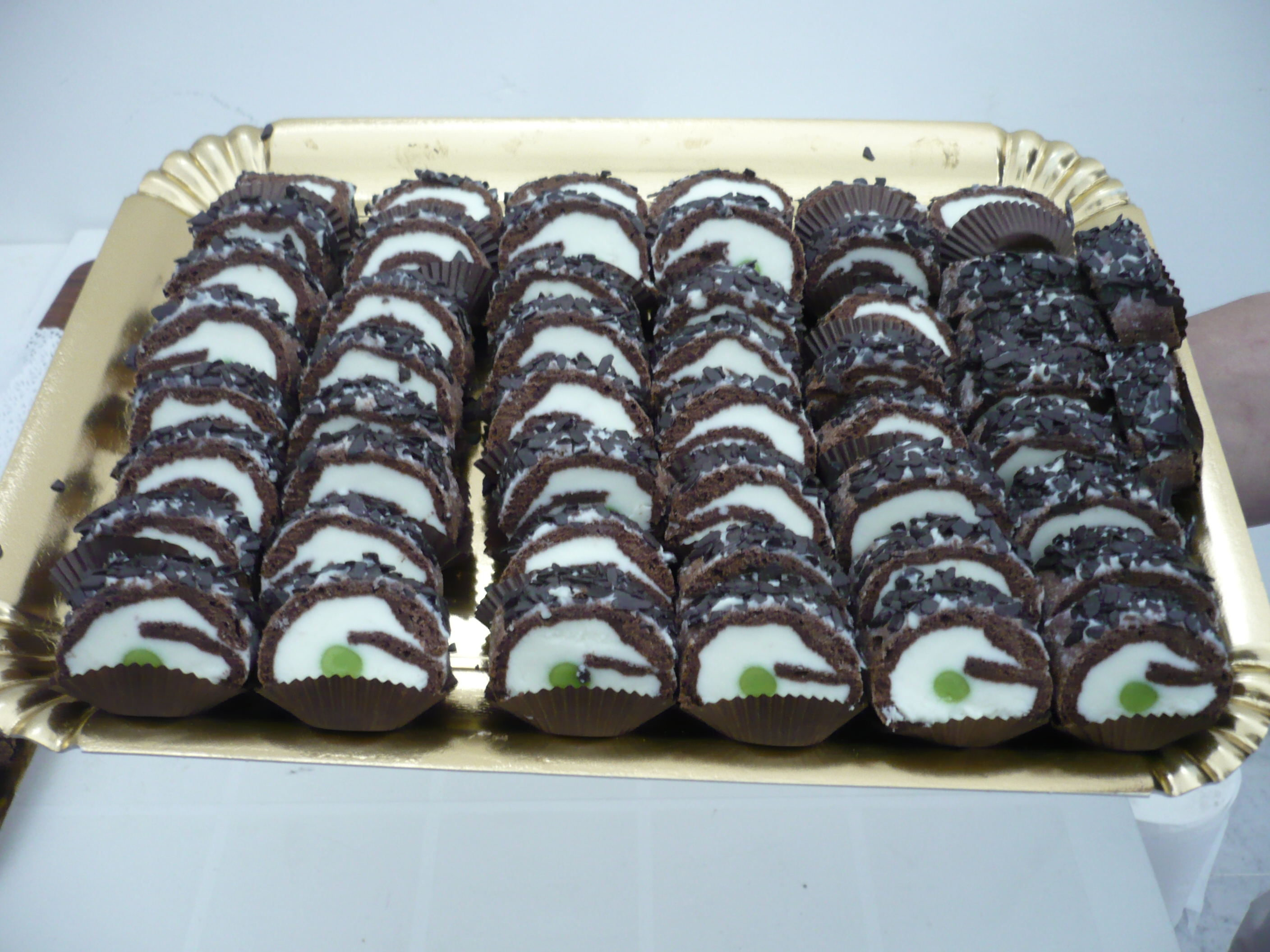 Rollò nisseno tipo mignon